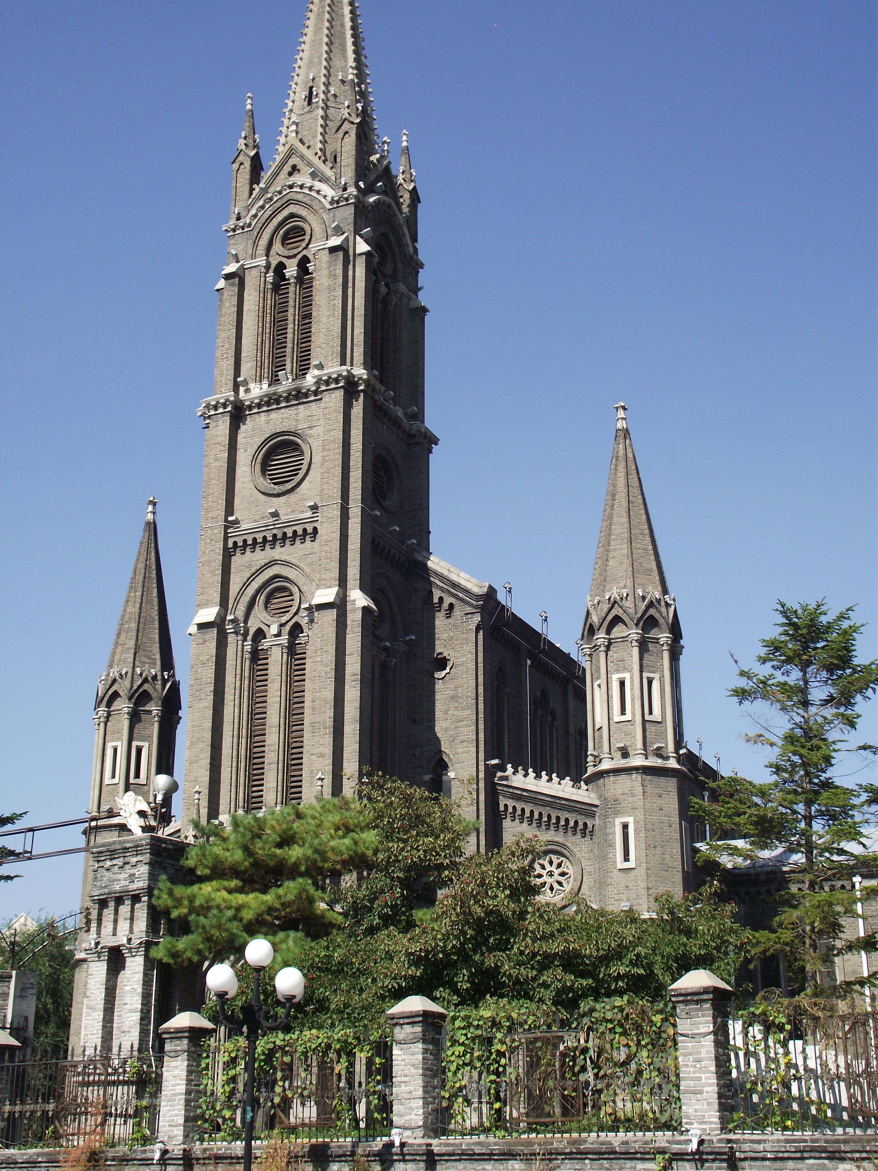 松花江景区教堂DSCF0160